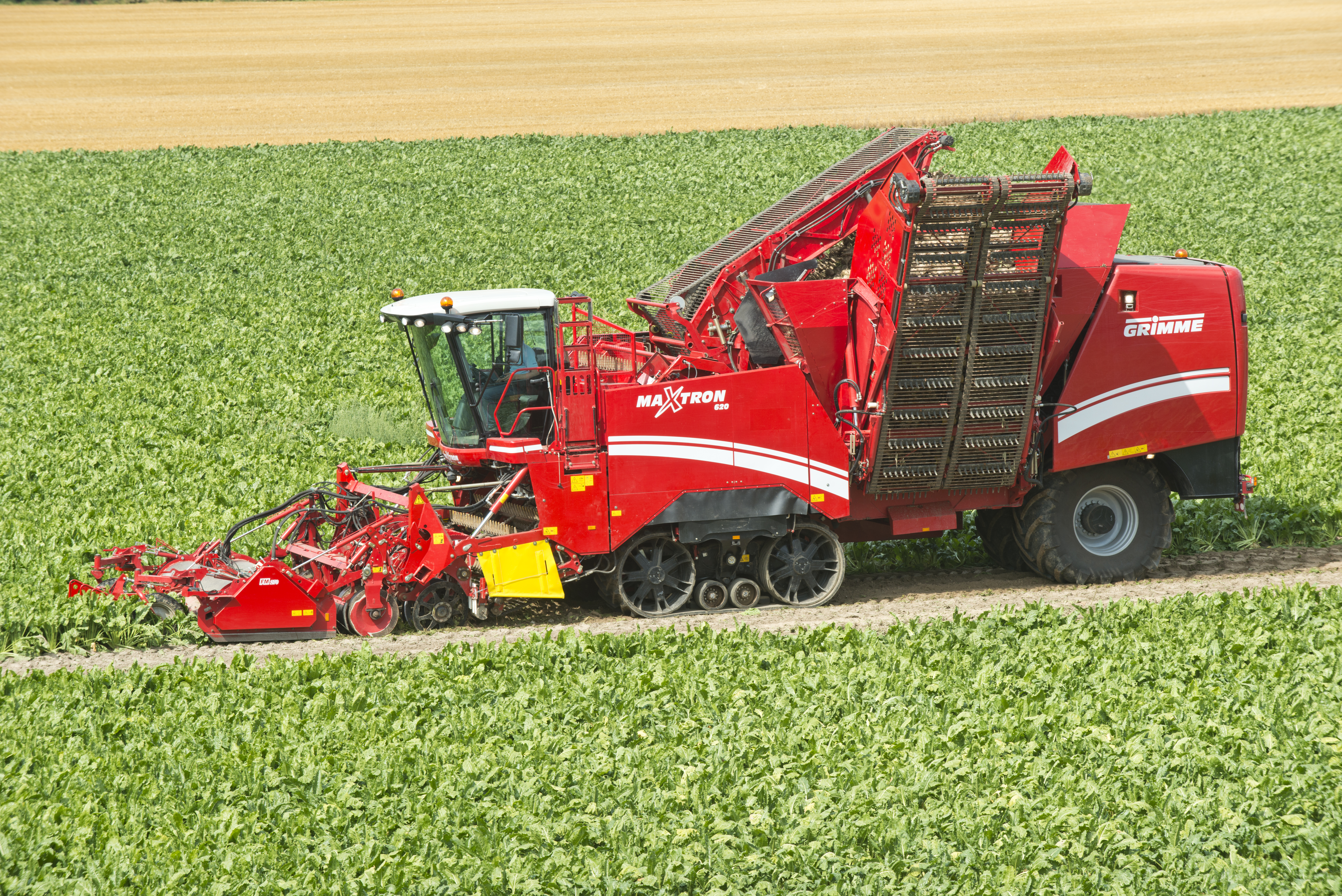 Der 6-reihige MAXTRON 620 ist Dank des Fahrwerkskonzeptes mit Gurtbandlaufwerken ist der Maxtron 620 der bodenschonendste und wendigste Rübenroder weltweit. Der Bunker fasst 22 Tonnen.